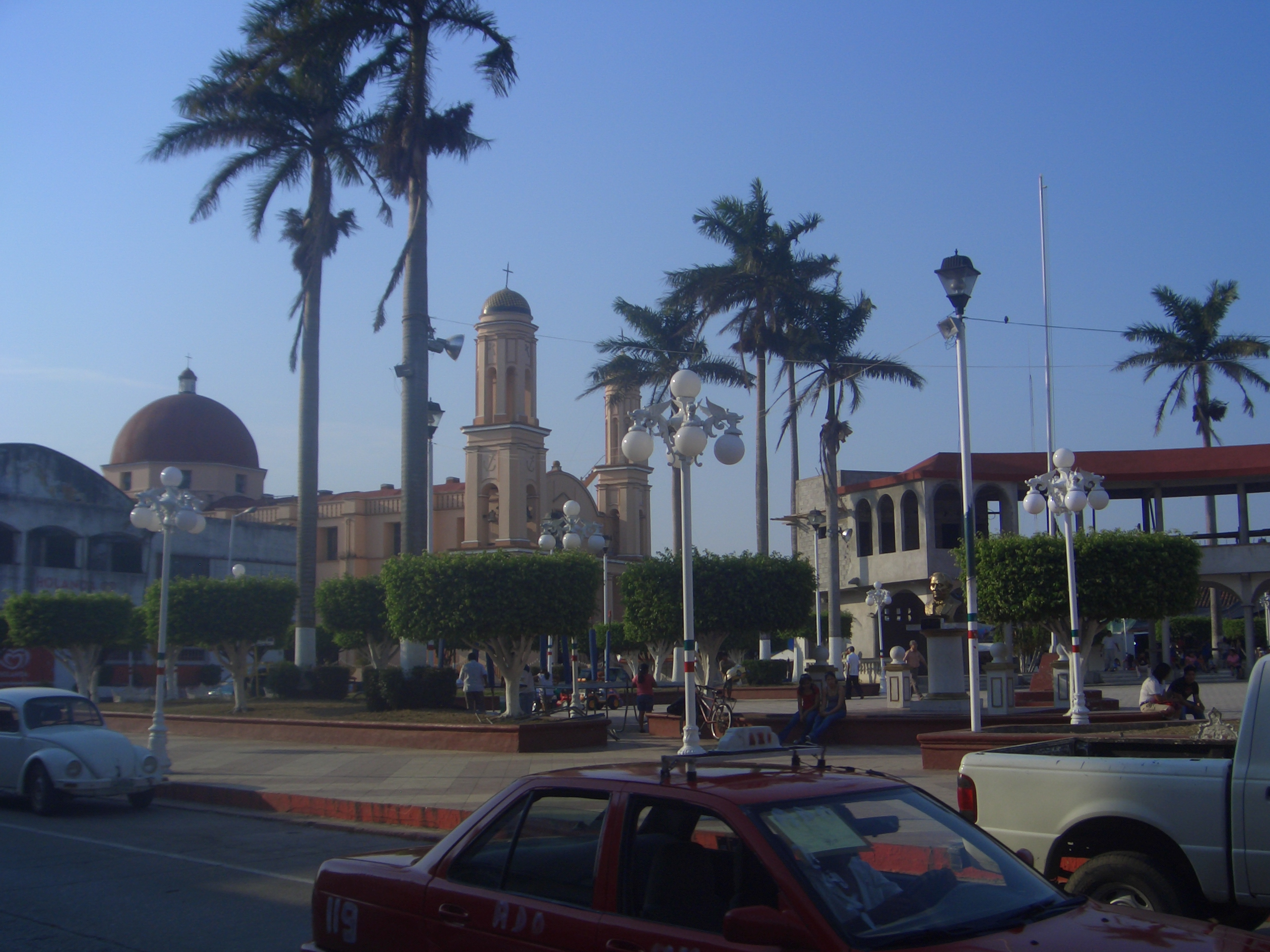 Parque central Marcos Carrillo Herrera en Cosamaloapan, Veracruz, México.